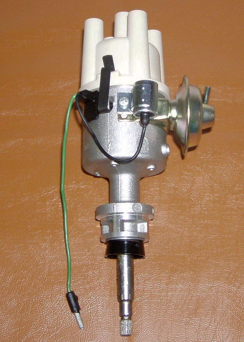 spinterogeno_motore_Fiat